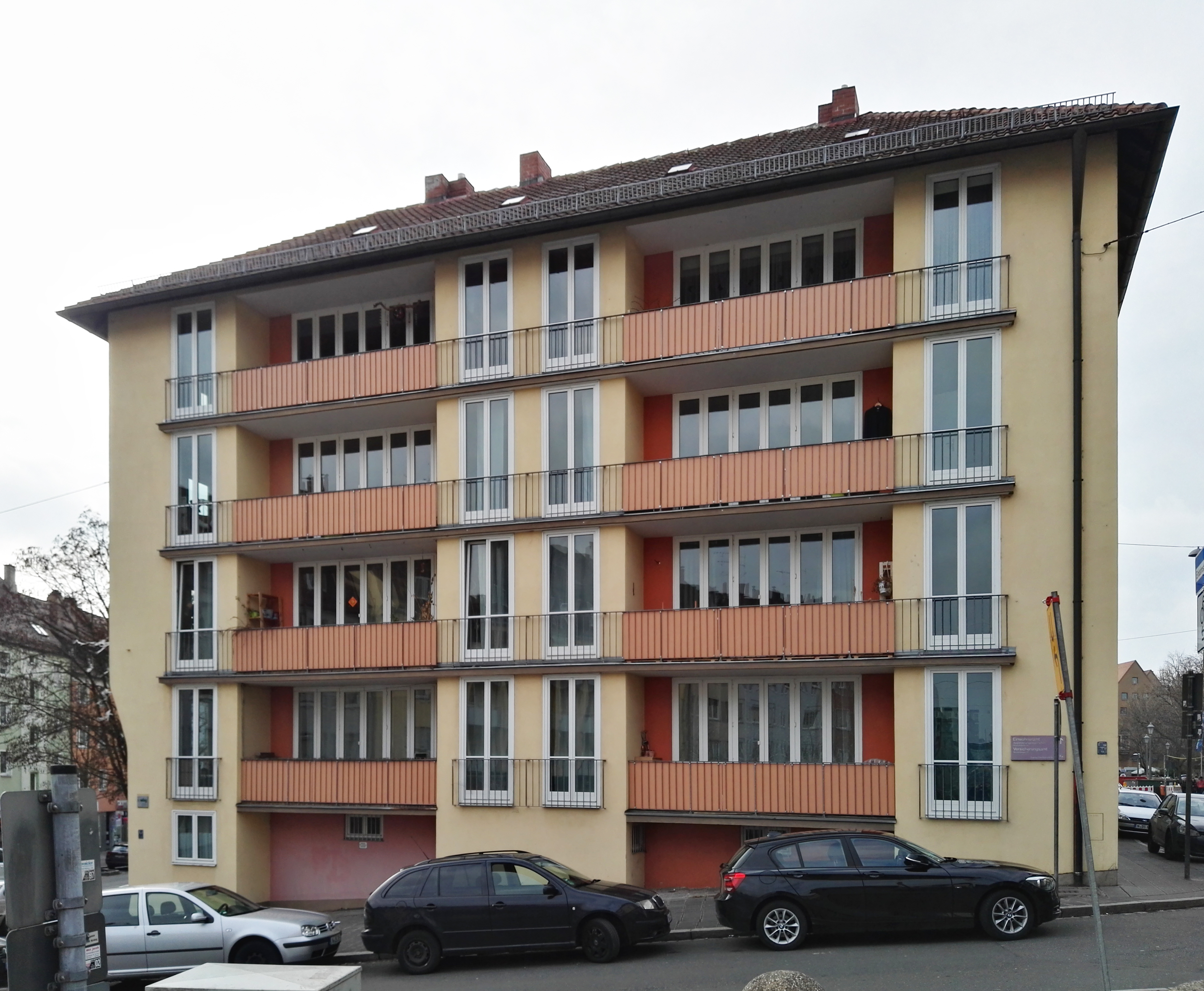 denkmalgeschützte Wohnanlage Hirschelgasse 36; Hirschelgasse 38; Hirschelgasse 40; Hirschelgasse 42; Äußere Laufer Gasse 29 in Nürnberg